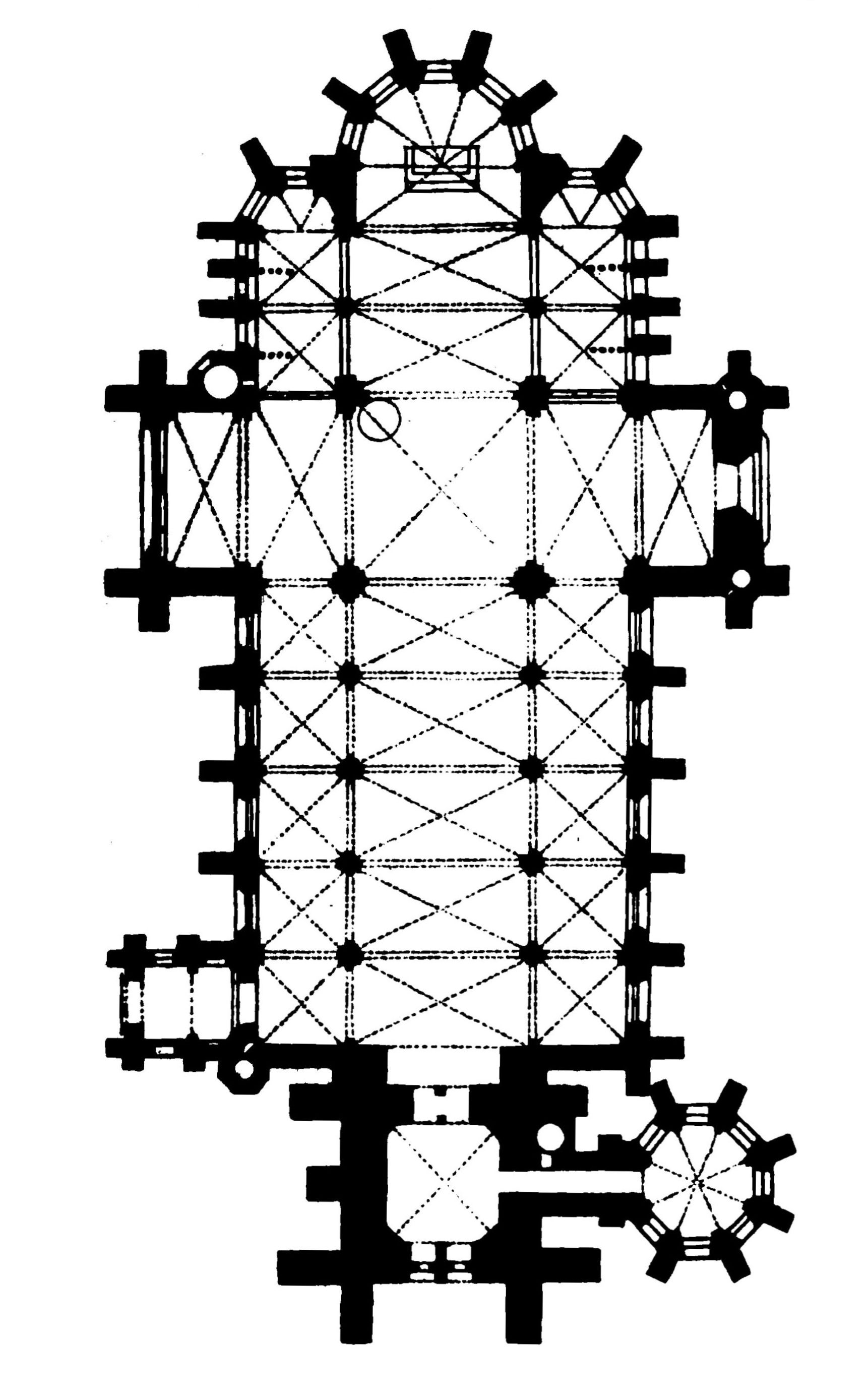 Grundriss der Kirch St. Nikolai in Hamburg